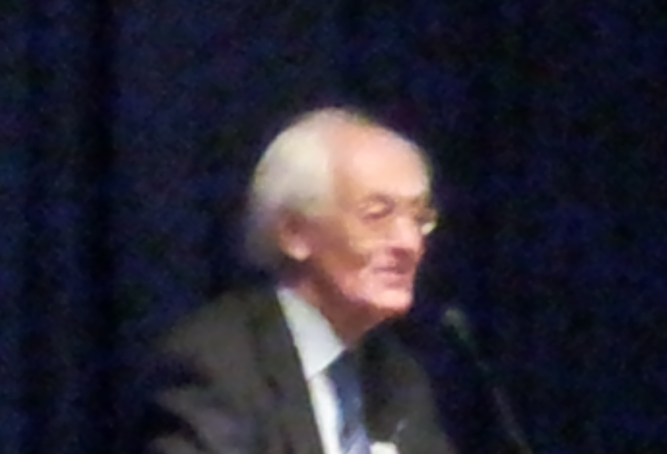 Cornelis (Kees) de Jager